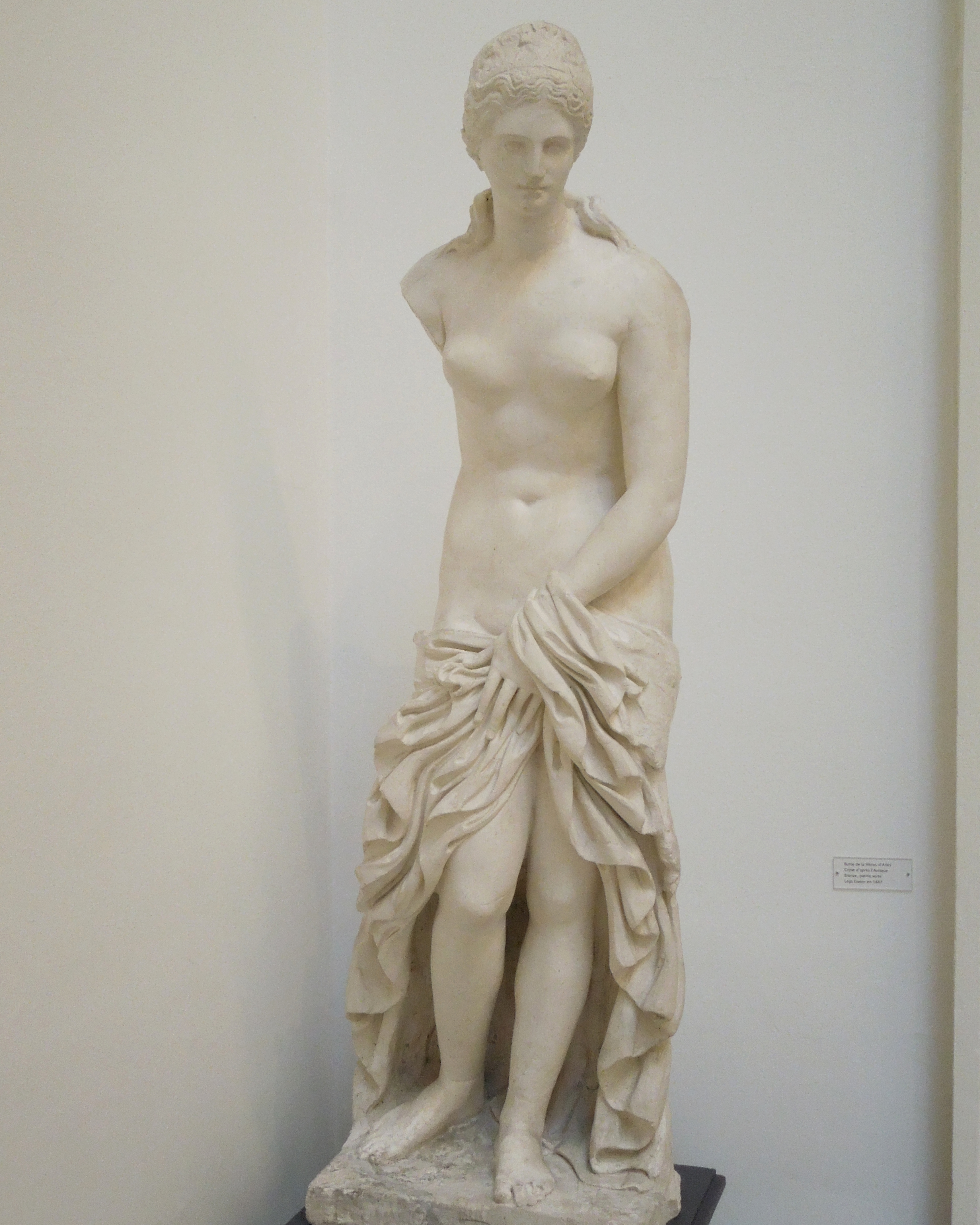 Léopold Mérignargues (Nîmes 1843 - 1916), sculpteur nîmois, connu entre autres pour avoir participé au décor sculpté de la galerie Jules Salles.